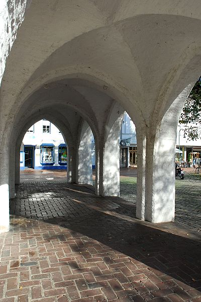 Erkelenz Altes Rathaus